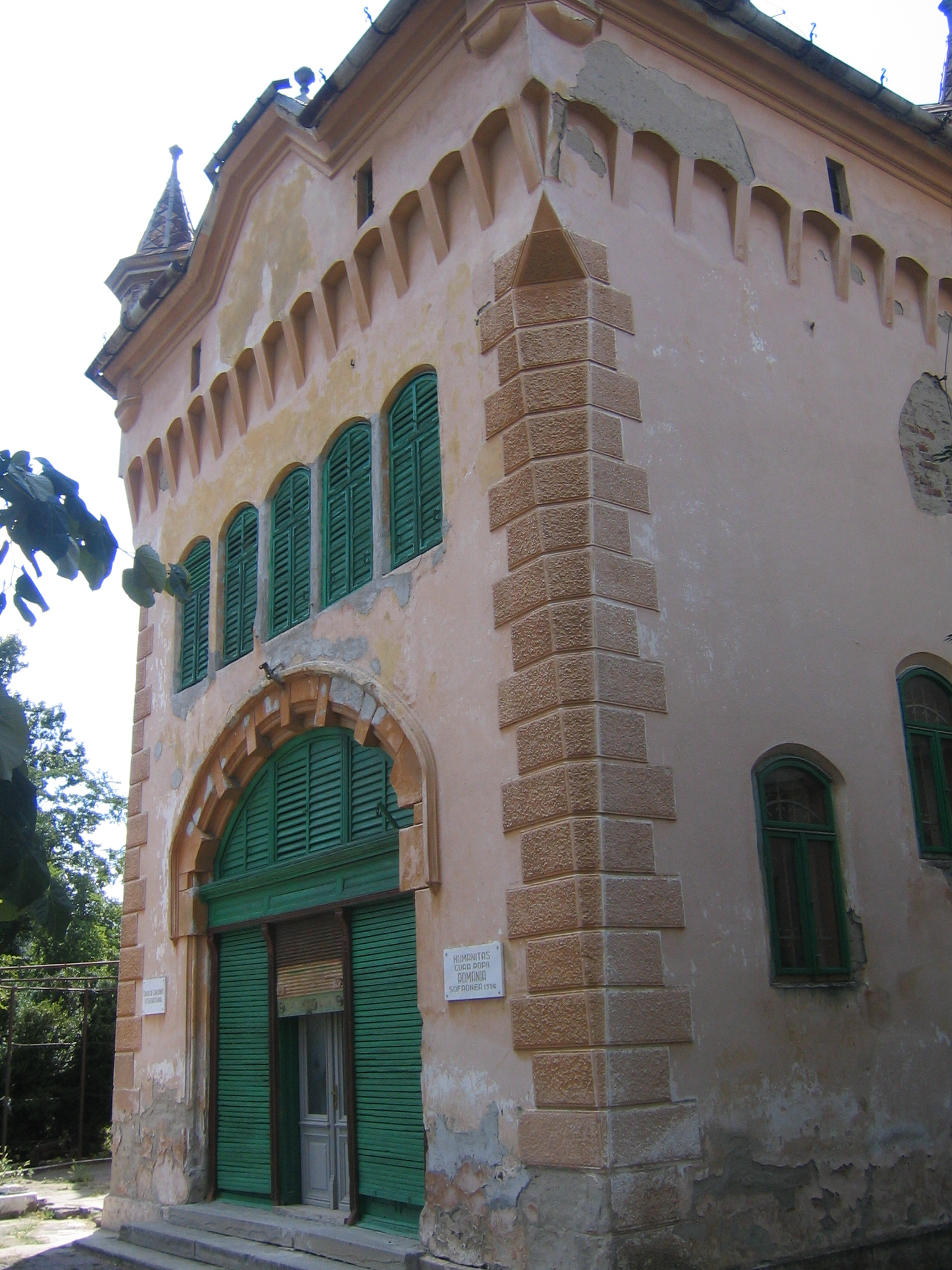 Castelul de la Sofronea, Arad. (intrare)